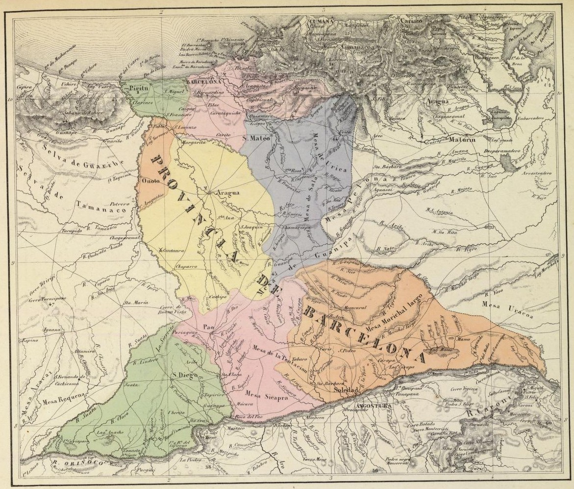 Provincia de Barcelona. Tomado del "Atlas físico y político de la República de Venezuela", 1840.